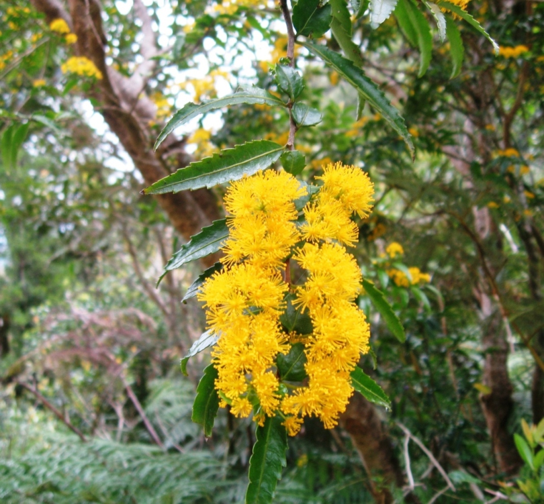 Flores de Azara lanceolata, parque Oncol, Valdivia, Chile